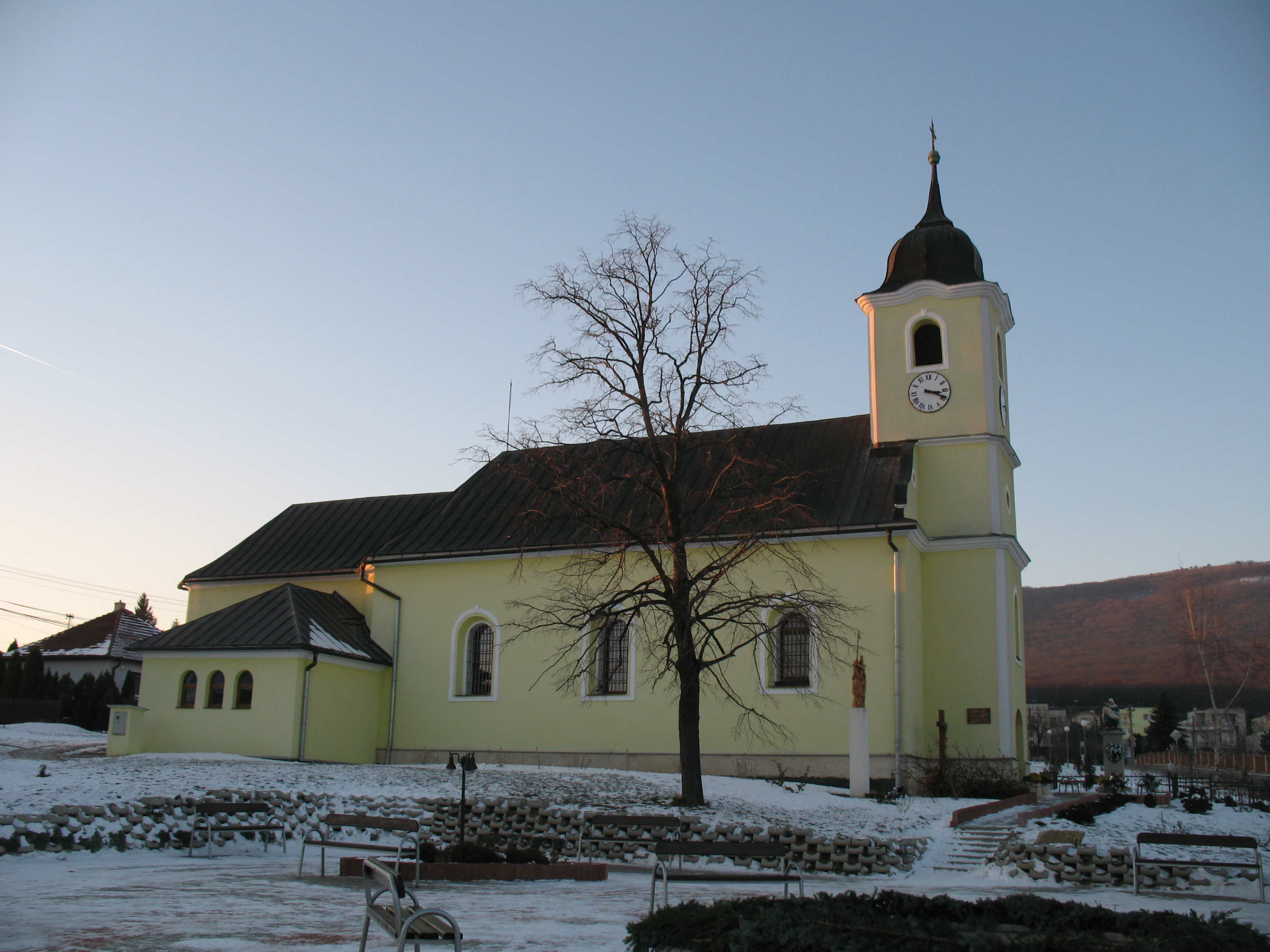 Nyitragerencsér